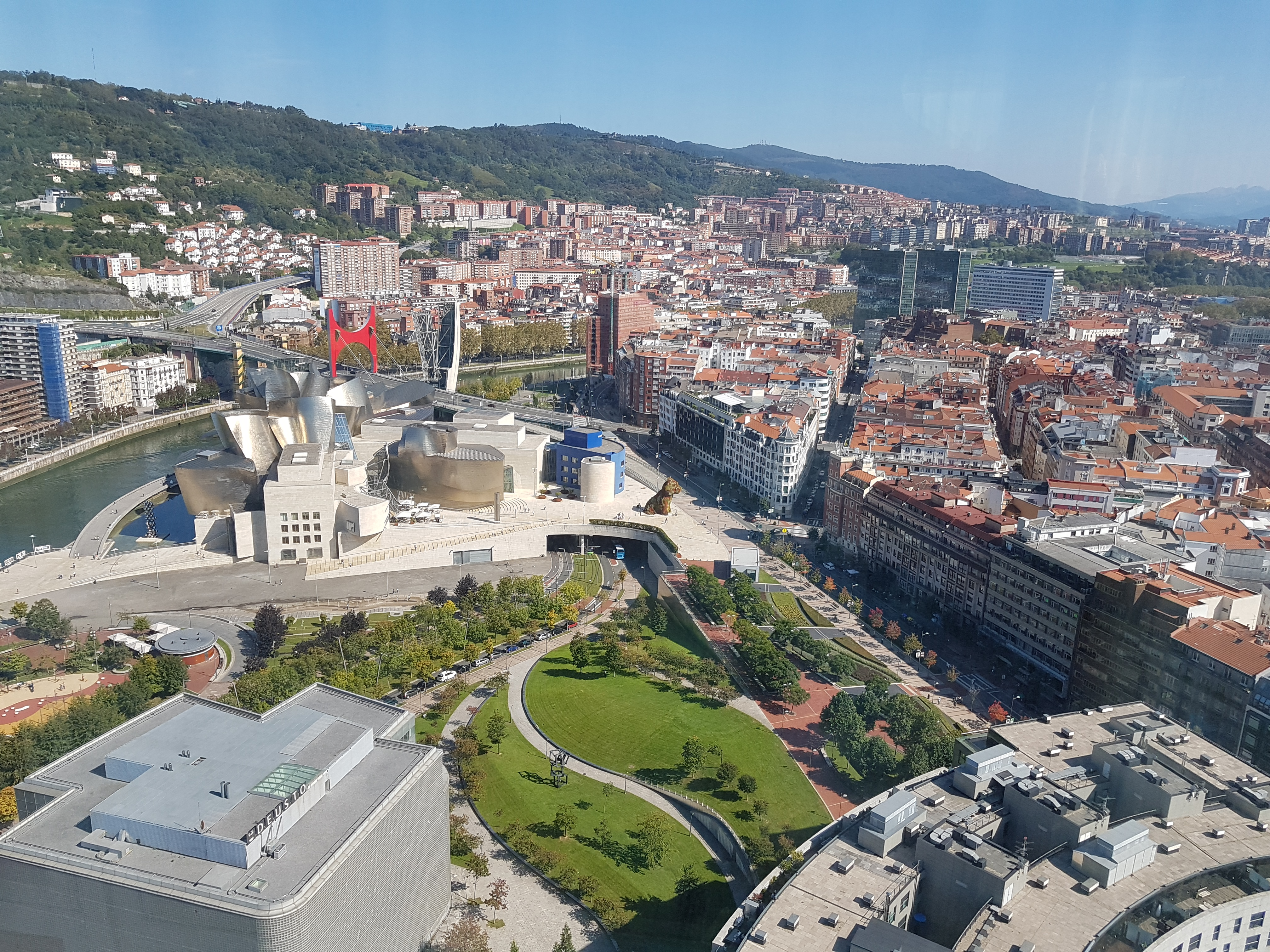 Abandoibarra.